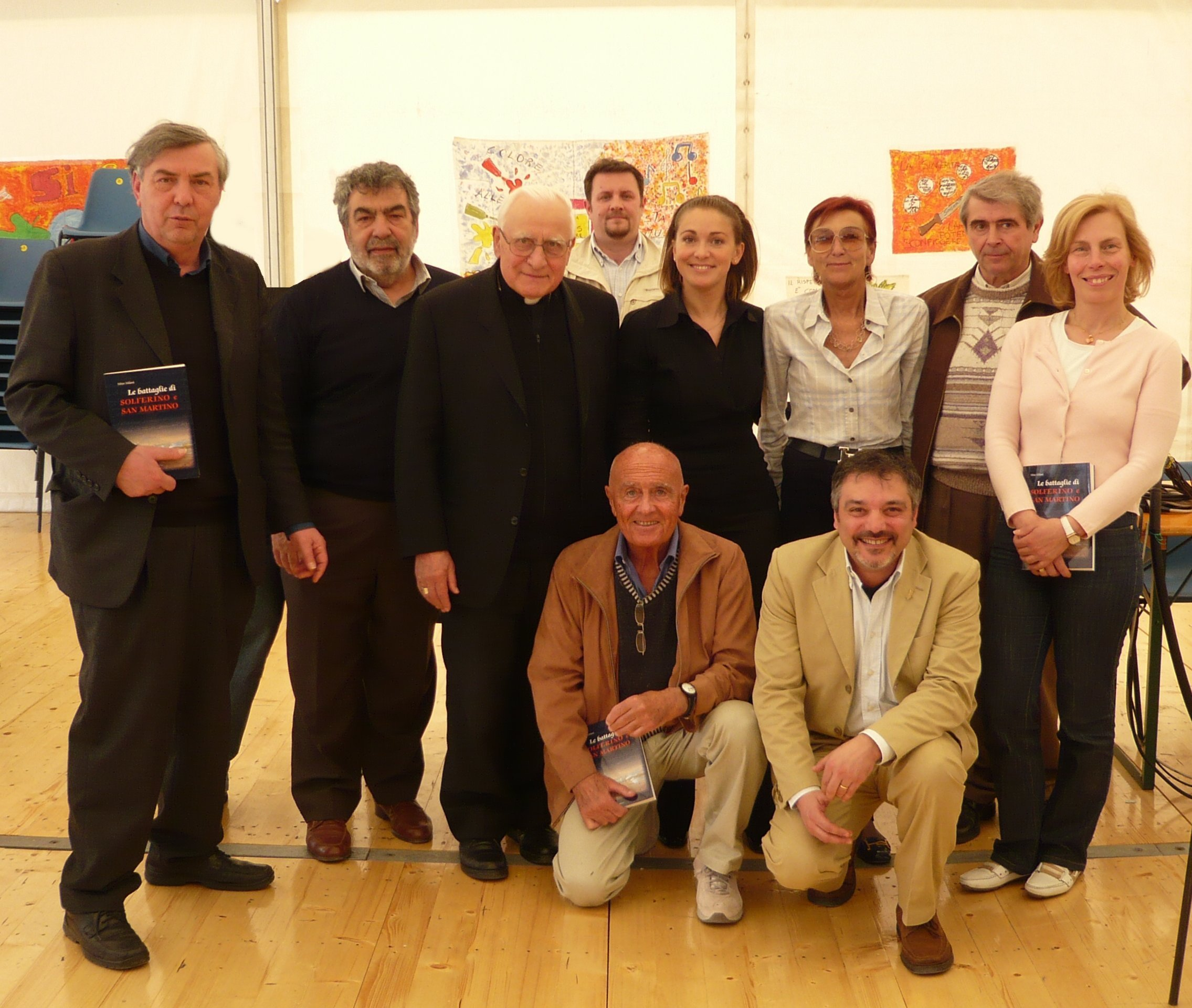 Lo scrittore Mino Milani (in ginocchio a sx) con alcuni collaboratori a Medole durante un convegno con tema un suo libro sulla battaglia di Solferino e San Martino .